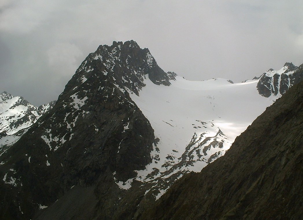 Ötztaler Alpen, Kaunergrat, Seekogel